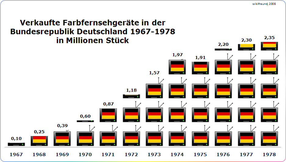 Verkaufszahlen von Farbfernsehgeräten in der Bundesrepublik Deutschland von 1967 bis 1978 in Millionen Stück.